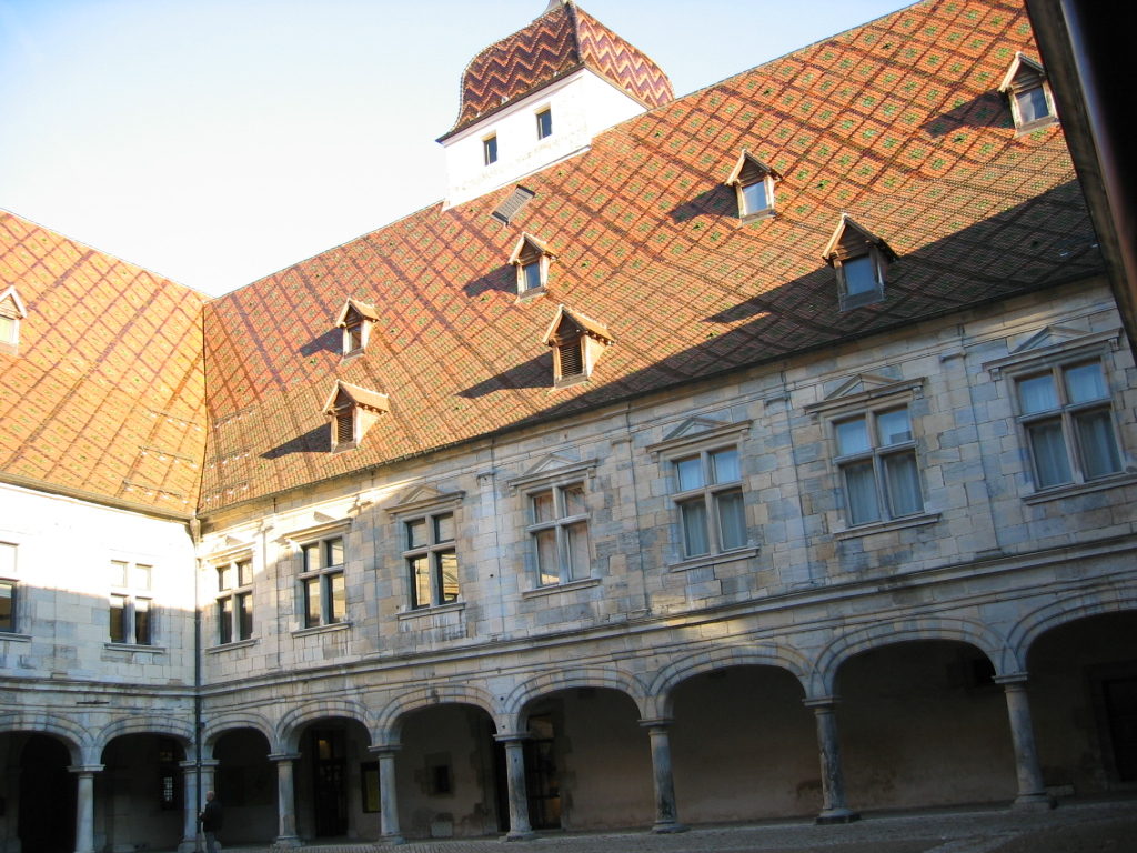 Cours interieur Palais Granvelle - Besançon - Franche Comté - France